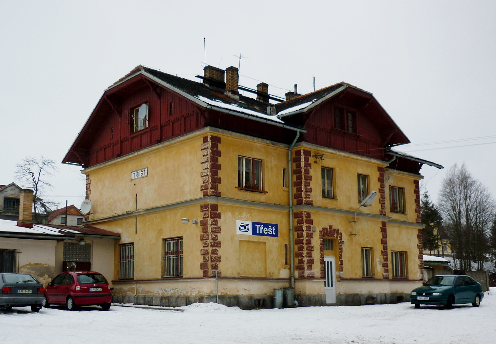 Nádraží Českých drah v Třešti